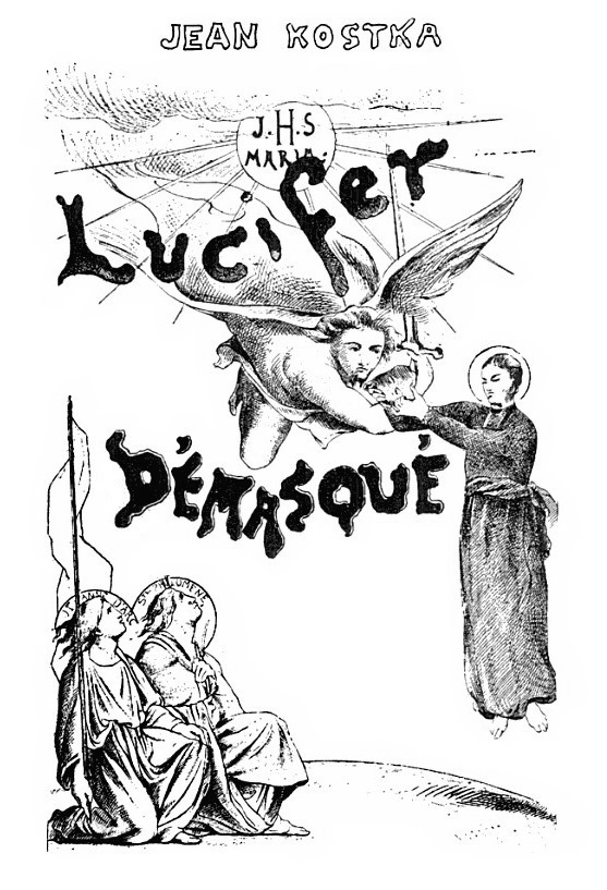 Couverture ou frontispice de : Jean Kostka (Doinel), Lucifer démasqué, Paris, 1895.